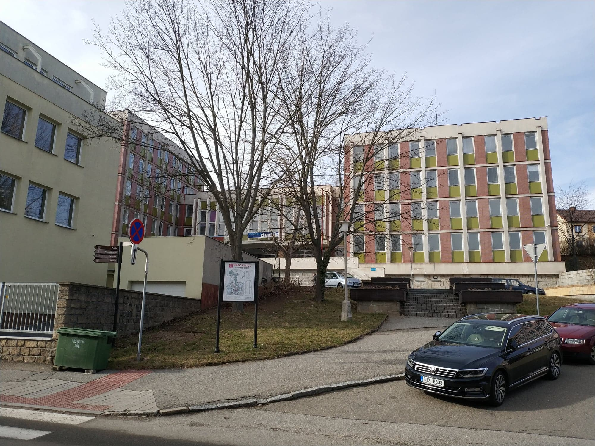 Dům České spořitelny v Prachaticích. Česká republika.